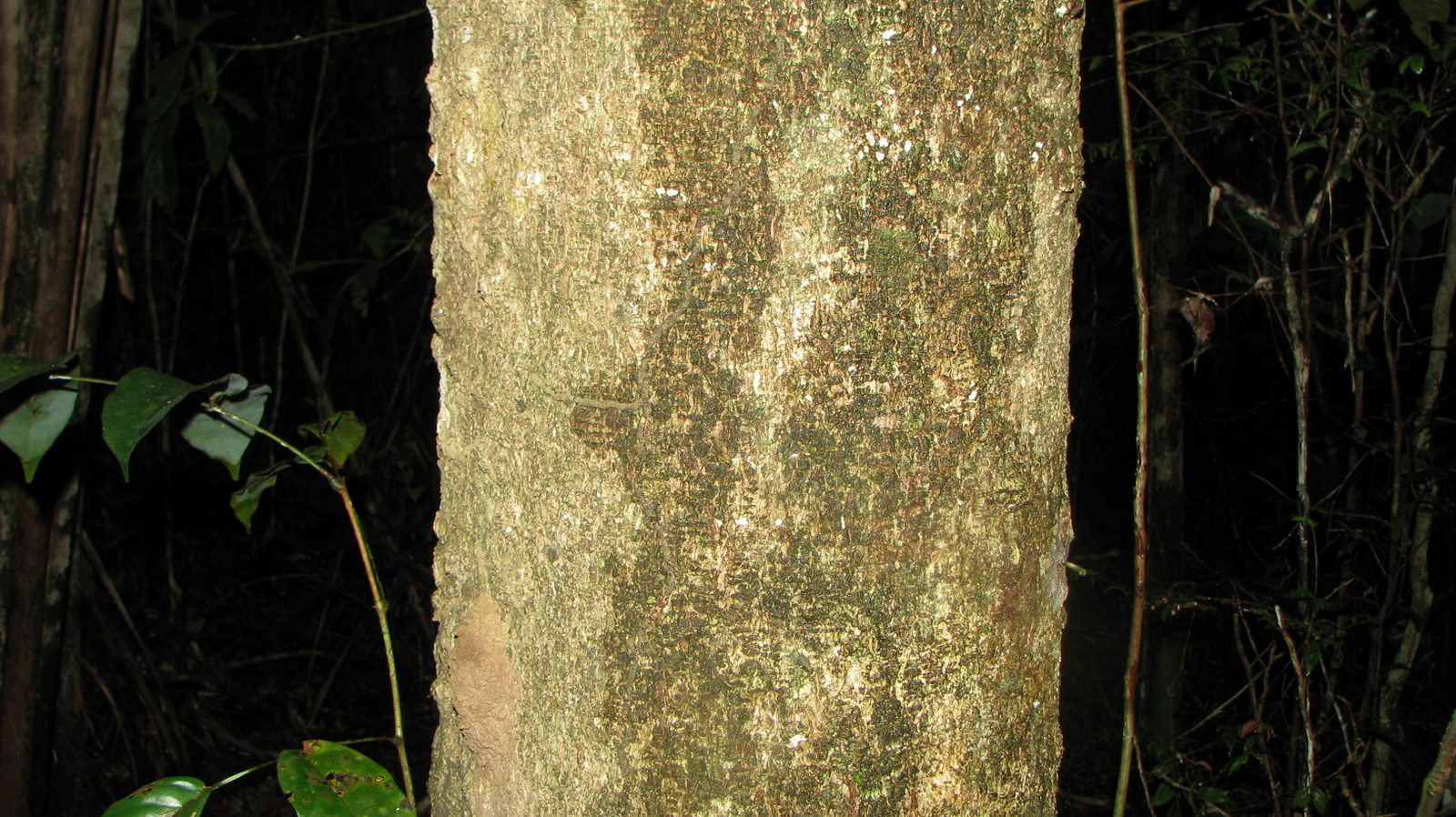 Parinari leontopitheci Prance